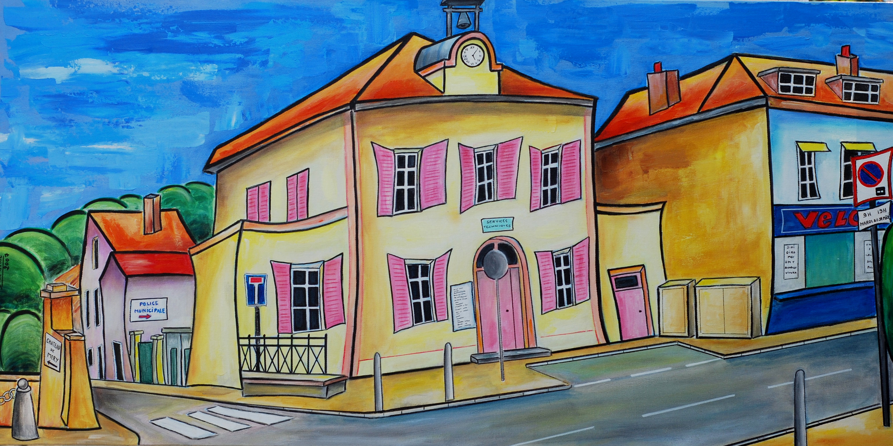 L'ancienne mairie de Méry-sur-Oise, tableau du peintre contemporain Dominique Jurie (huile et acrylique sur toile, 100 x 50 cm).